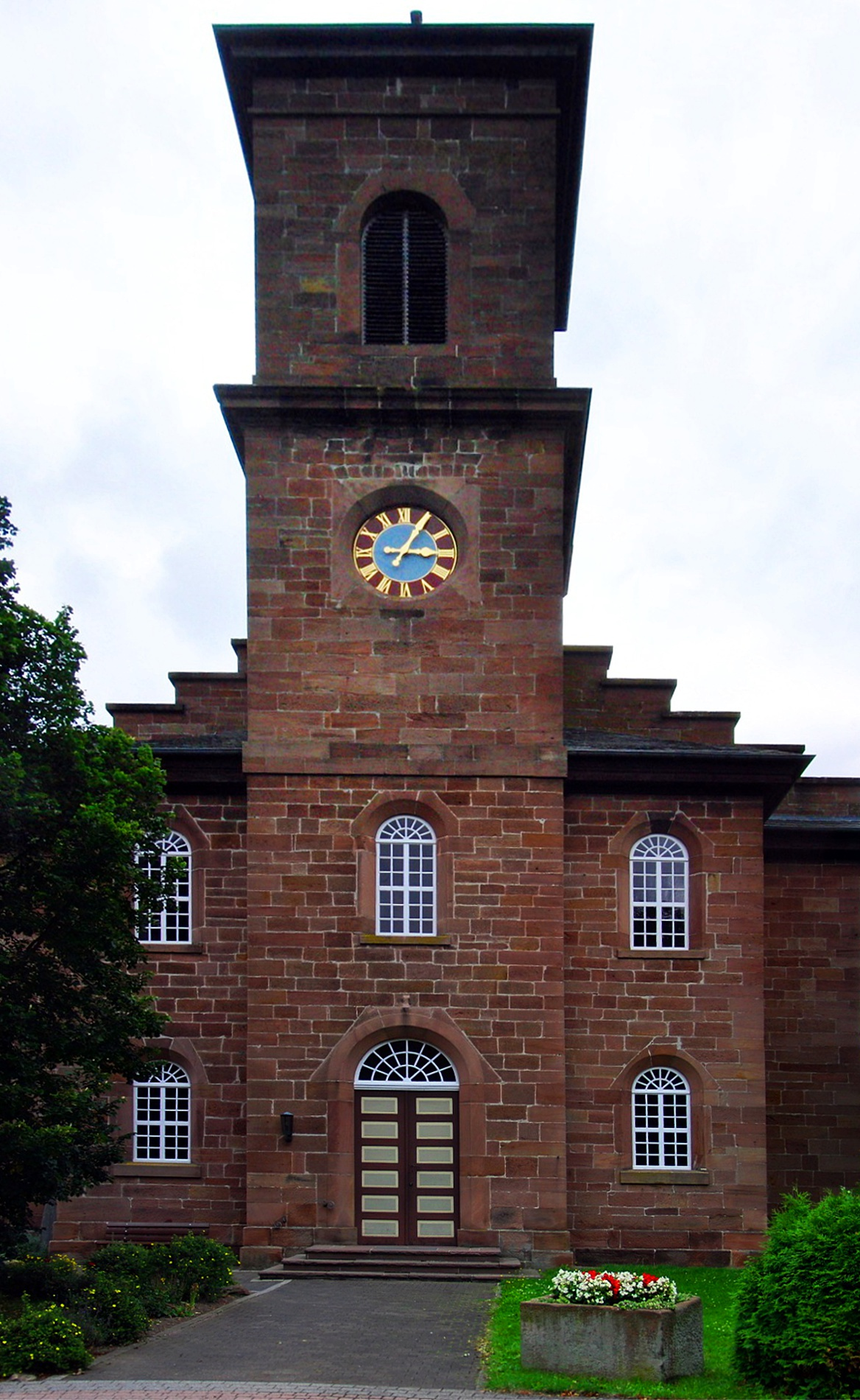 Panorama der Kirche in Loshausen (Hessen)